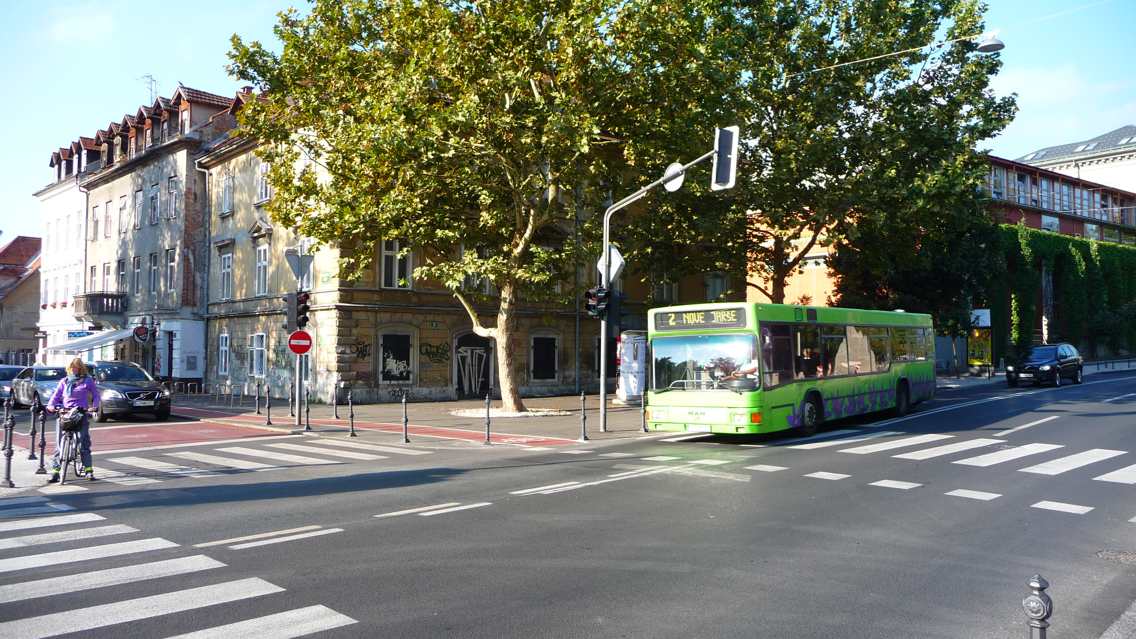 Bus in Ljubljana, Slovenia, September 2011